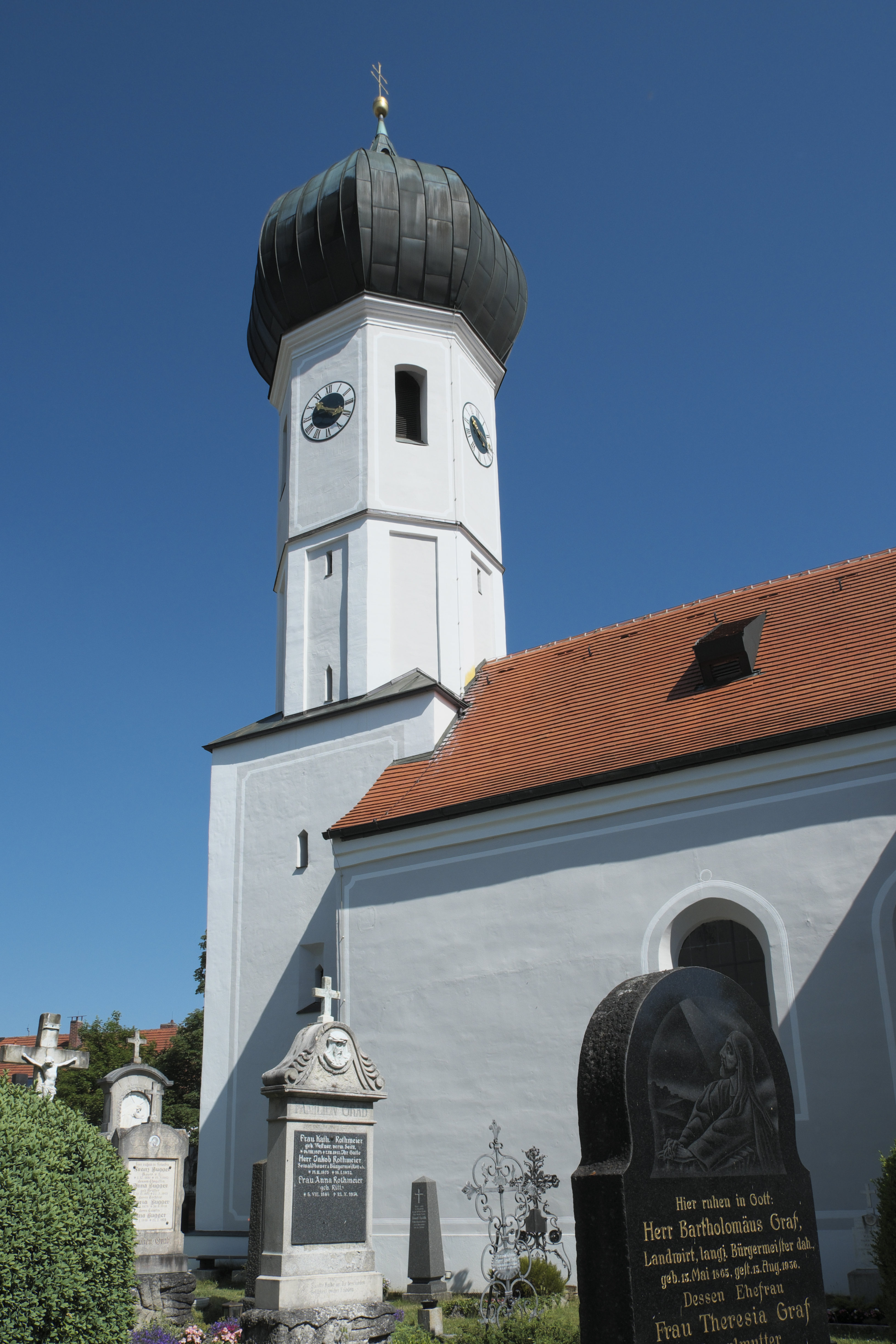 Katholische Nebenkirche Patrona Bavariae in Baierbrunn im Landkreis München (Bayern, Deutschland)